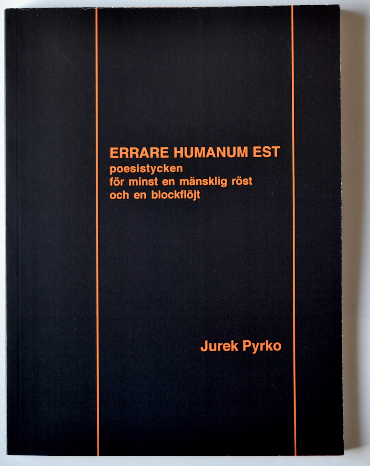 Errare humanum est